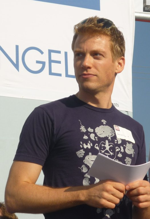 Barrett Foa